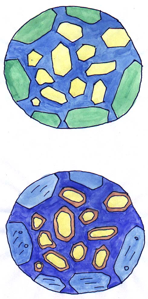 A kondrumok vizes átalakulása a kabai meteoriton, rajz